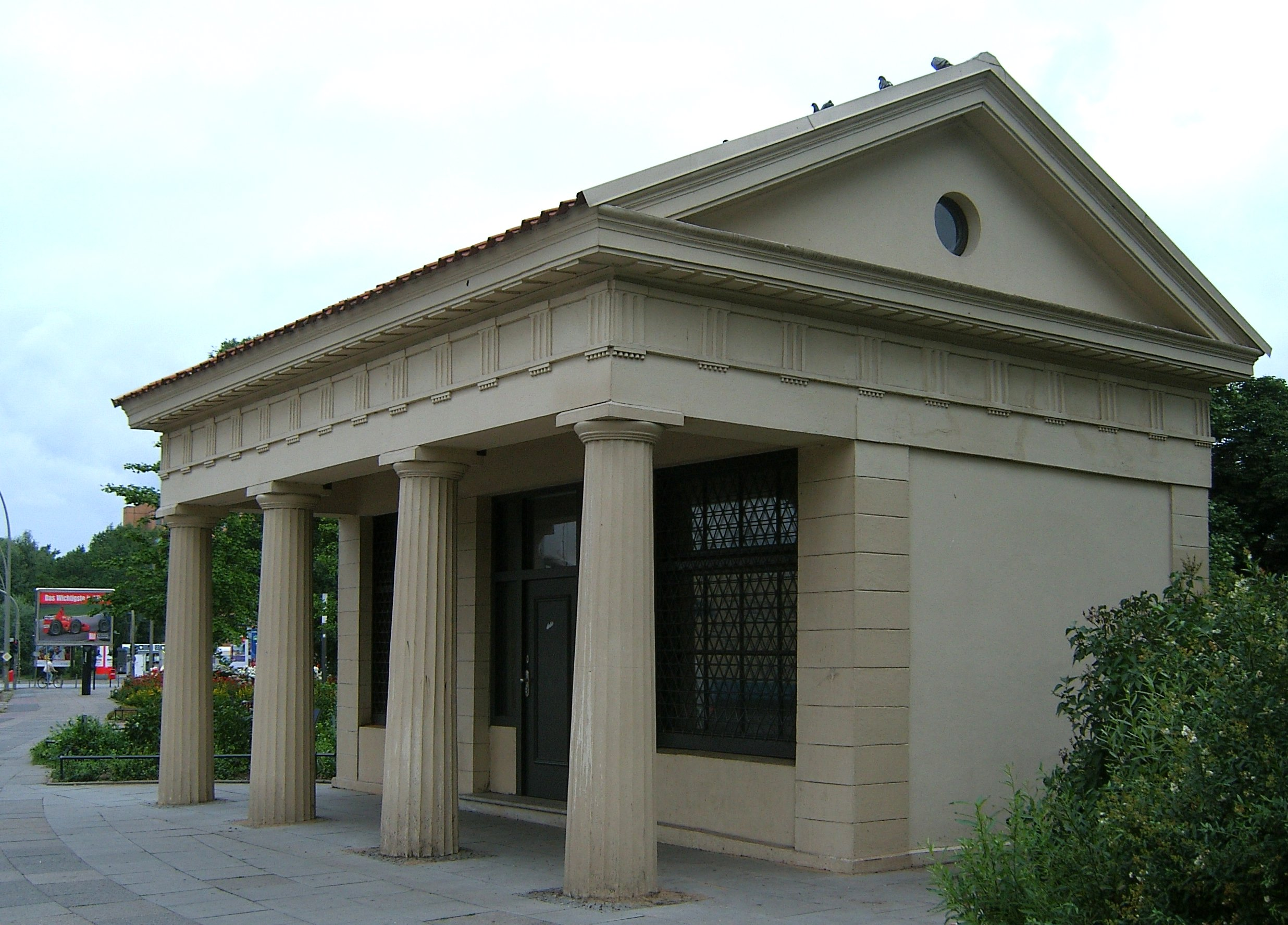 Die Millerntorwache am Millerntordamm in der Hamburger Neustadt ist das letzte erhaltene Wachhaus aus der Zeit der Torsperre. Es wurde 1819/20 im klassizistischen Stil mit dorischen Säulen von Carl Ludwig Wimmel erbaut.